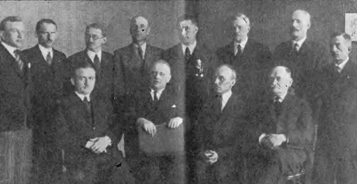 Wręczenie obywatelstwa honorowego gmin miejskich i wiejskich powiatu mościckiego dla dr. Jana Pomiankowskiego, które odbyło się w 1936 w sali "Rodziny Urzędniczej" we Lwowie. Na zdjęciu jest także widoczny burmistrz Sądowej Wiszni, Włodzimierz Paygert.